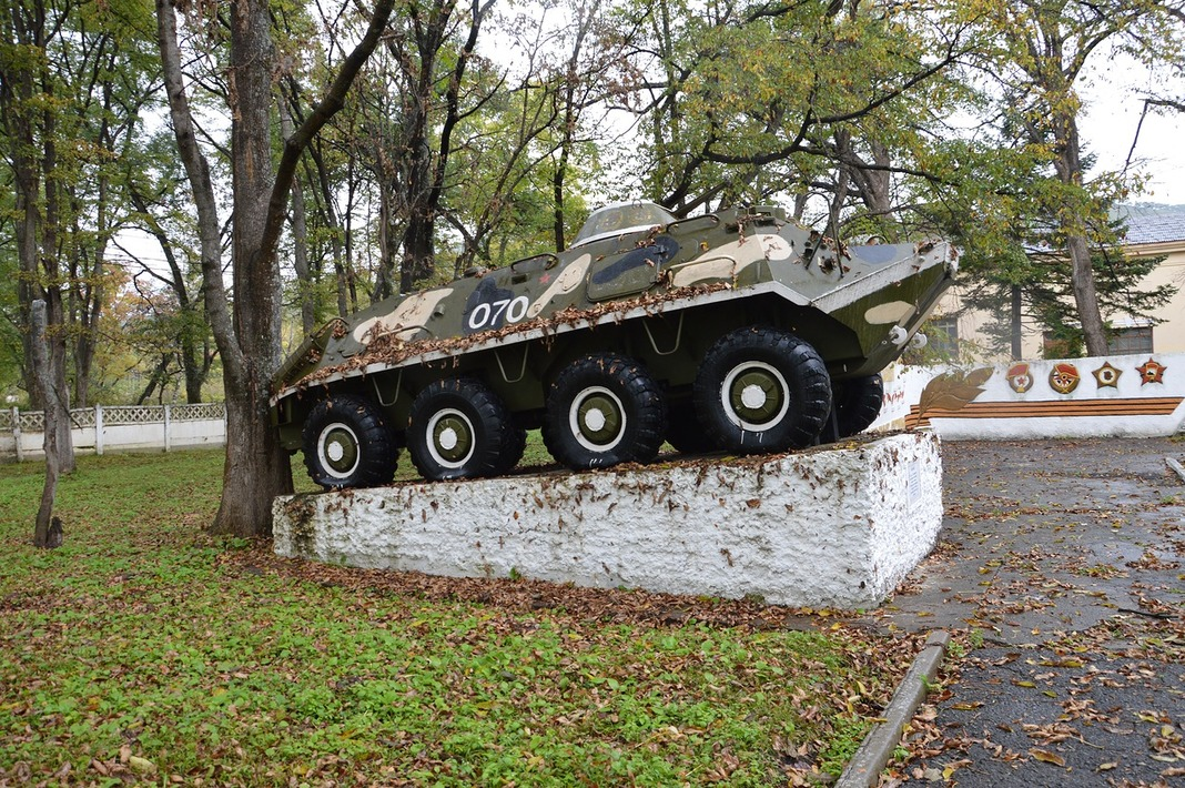 Мемориал в честь 123 Гвардейской мотострелковой орденов Красного знамени, Октябрьской революции и Суворова III степени Духовщинско-Хинганской дивизии в посёлке Барабаш Приморского края